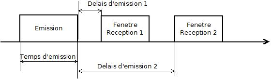 LoRaWan Fenetre